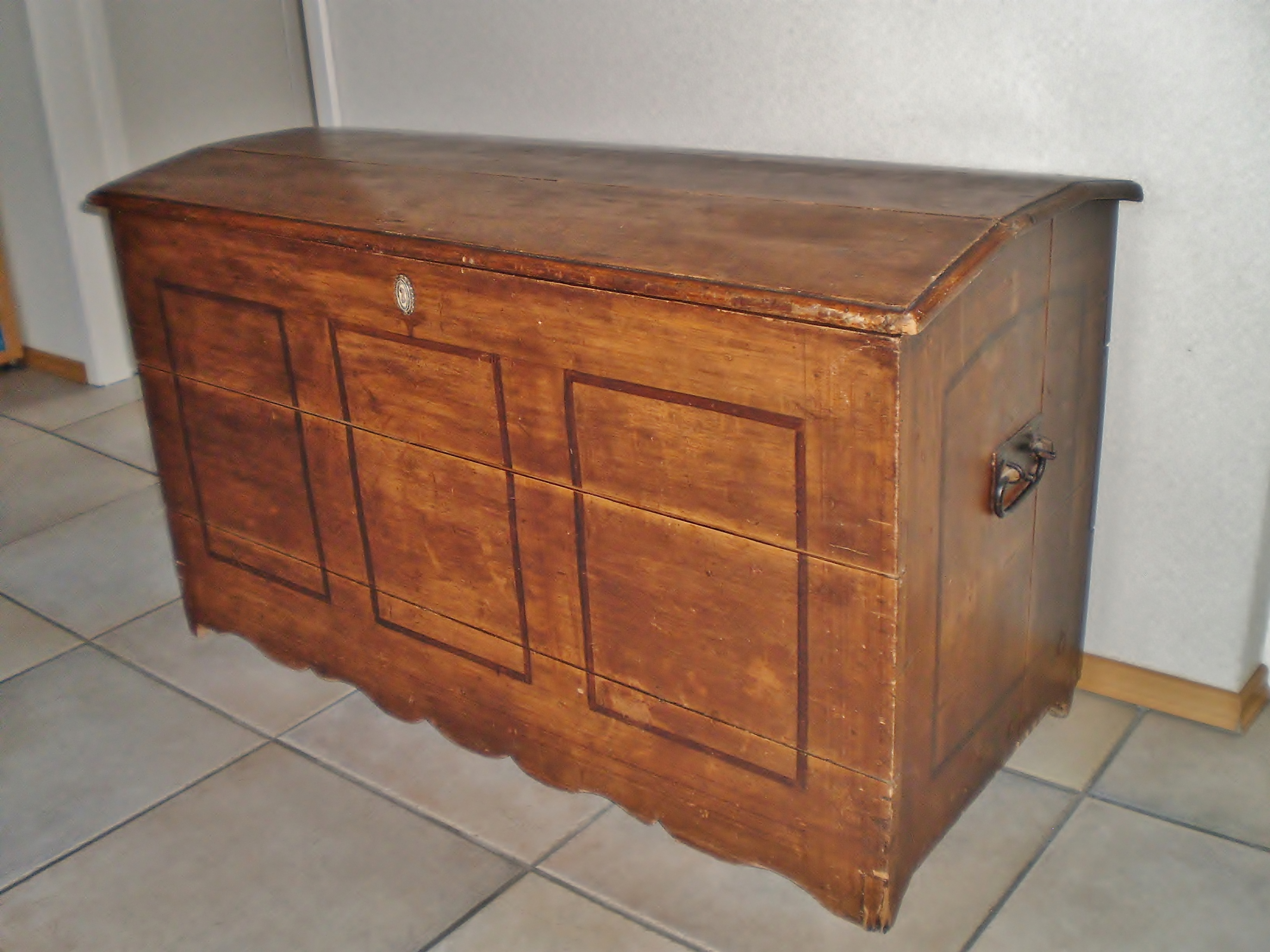 Dekenkist met hengsel en slot